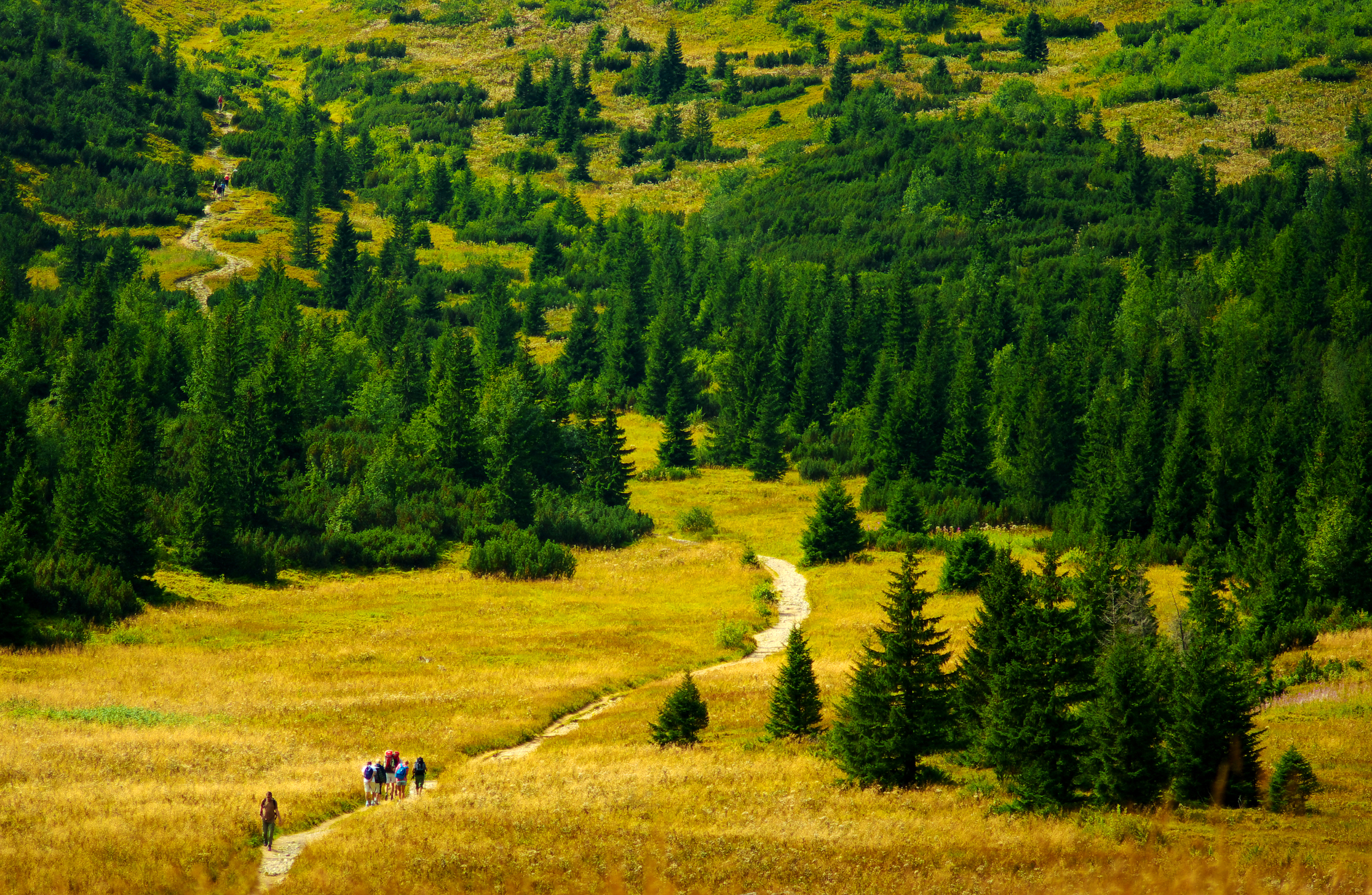 Dolina Kondratowa latem